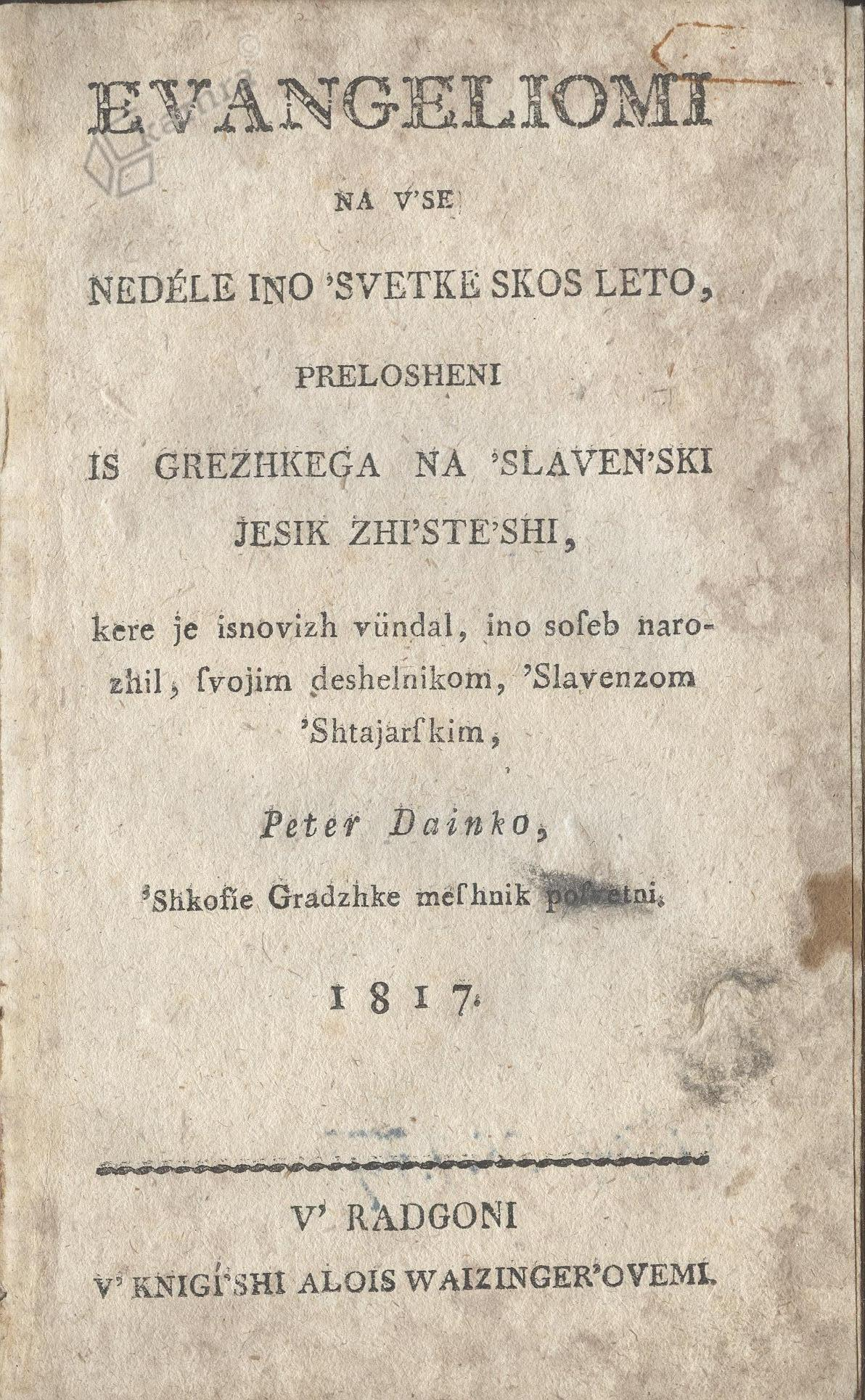 Evangeliomi na vse nedele inu svetke.